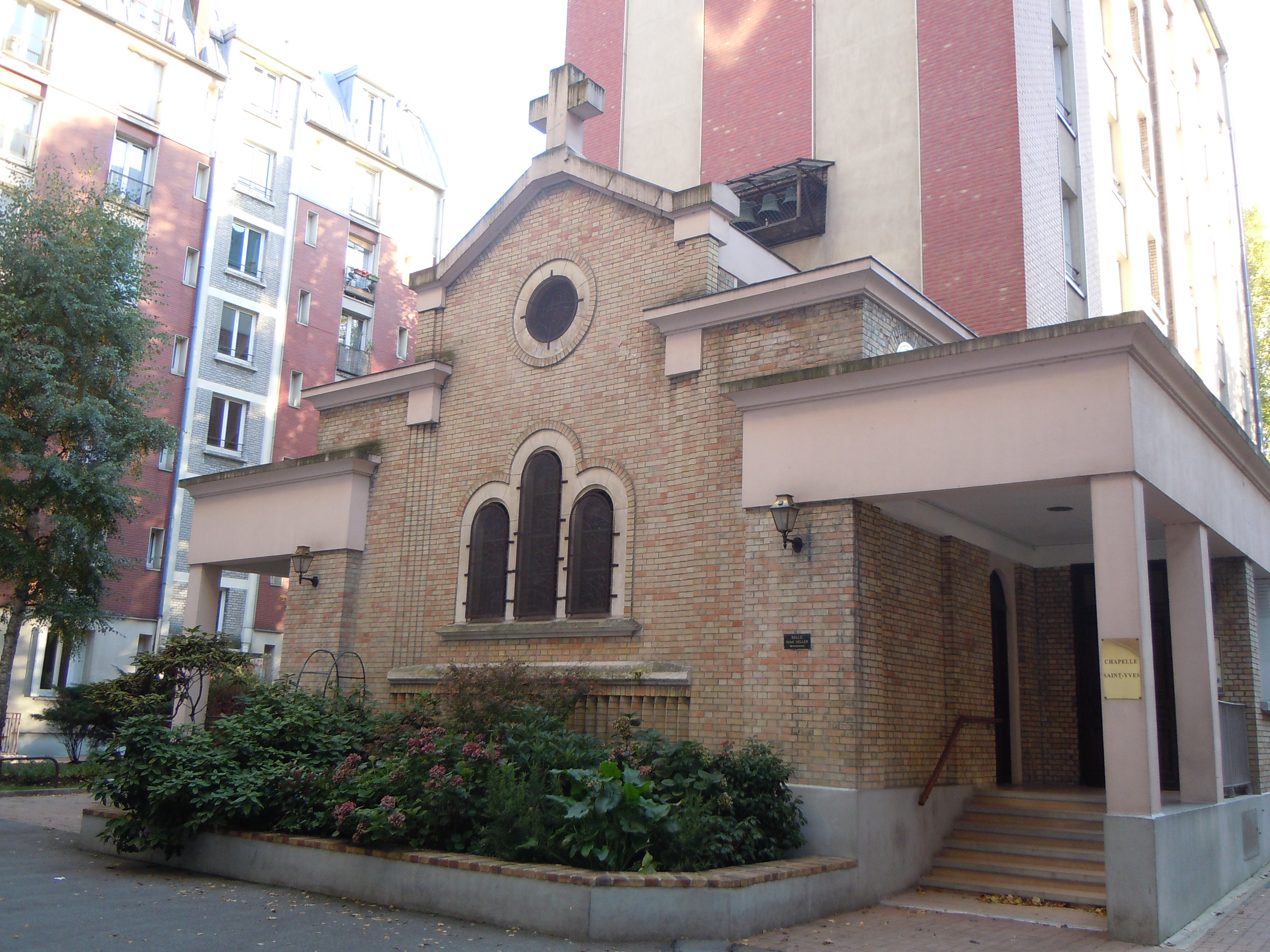 Chapelle Saint-Yves - Paris Cité du Souvenir